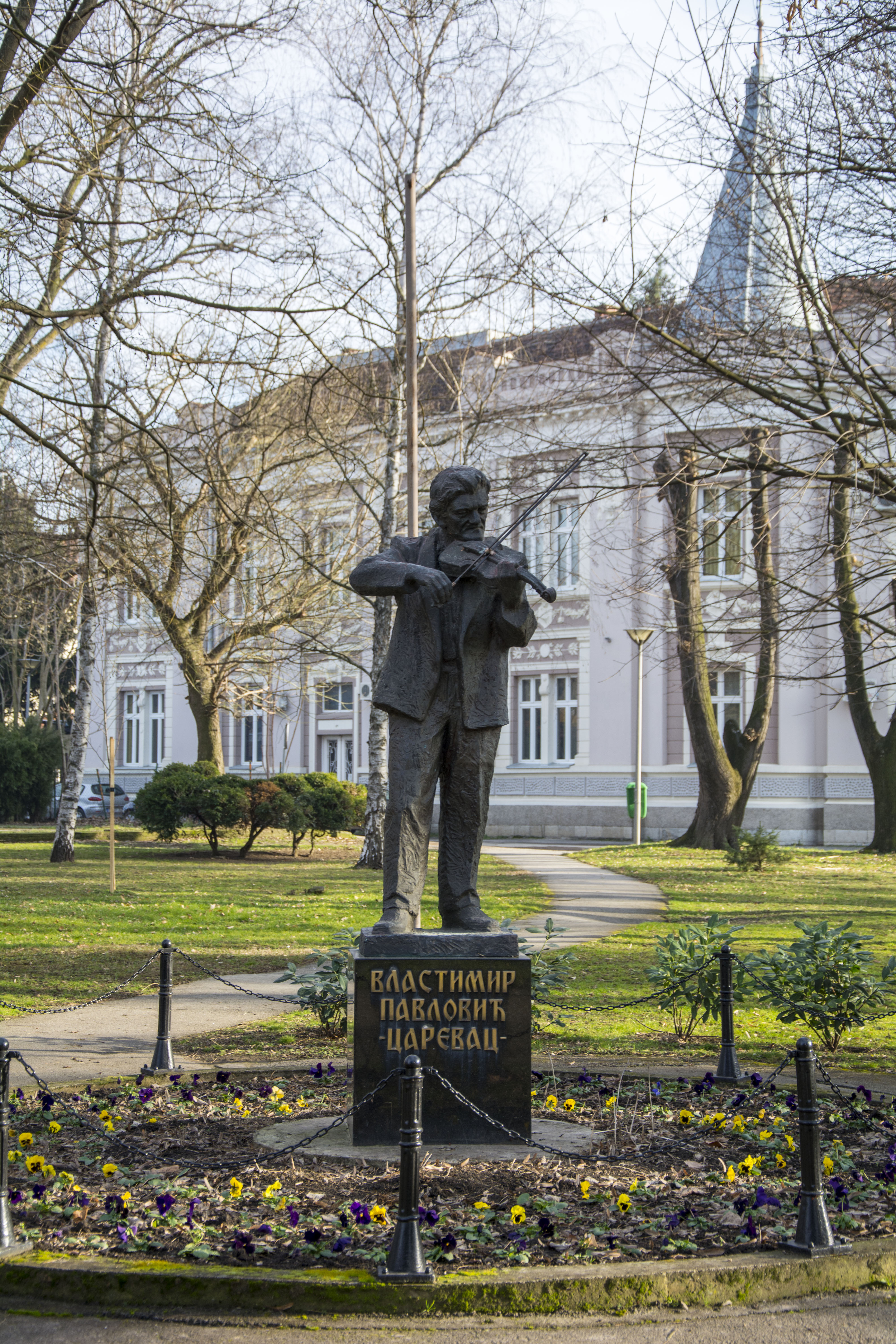 Велико Градиште споменик